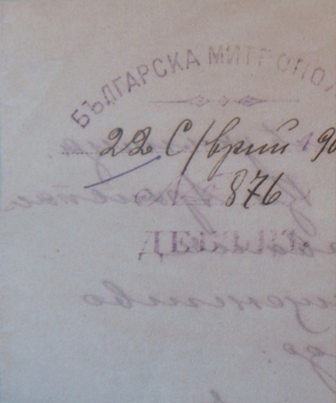 Глава на документ на Дебърската българска митрополия